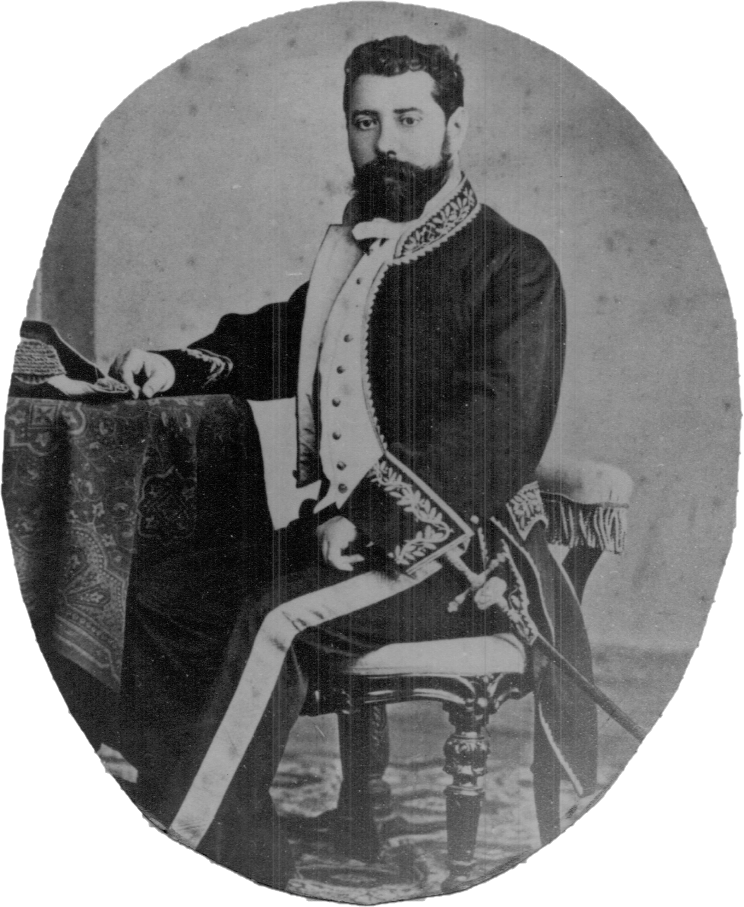 Fotografía del ingeniero de montes español, Santiago de Ugaldezubiaur Altónaga con el uniforme de su cuerpo. Presumiblemente tomada en el momento de su ingreso en el cuerpo como ingeniero de segunda clase.